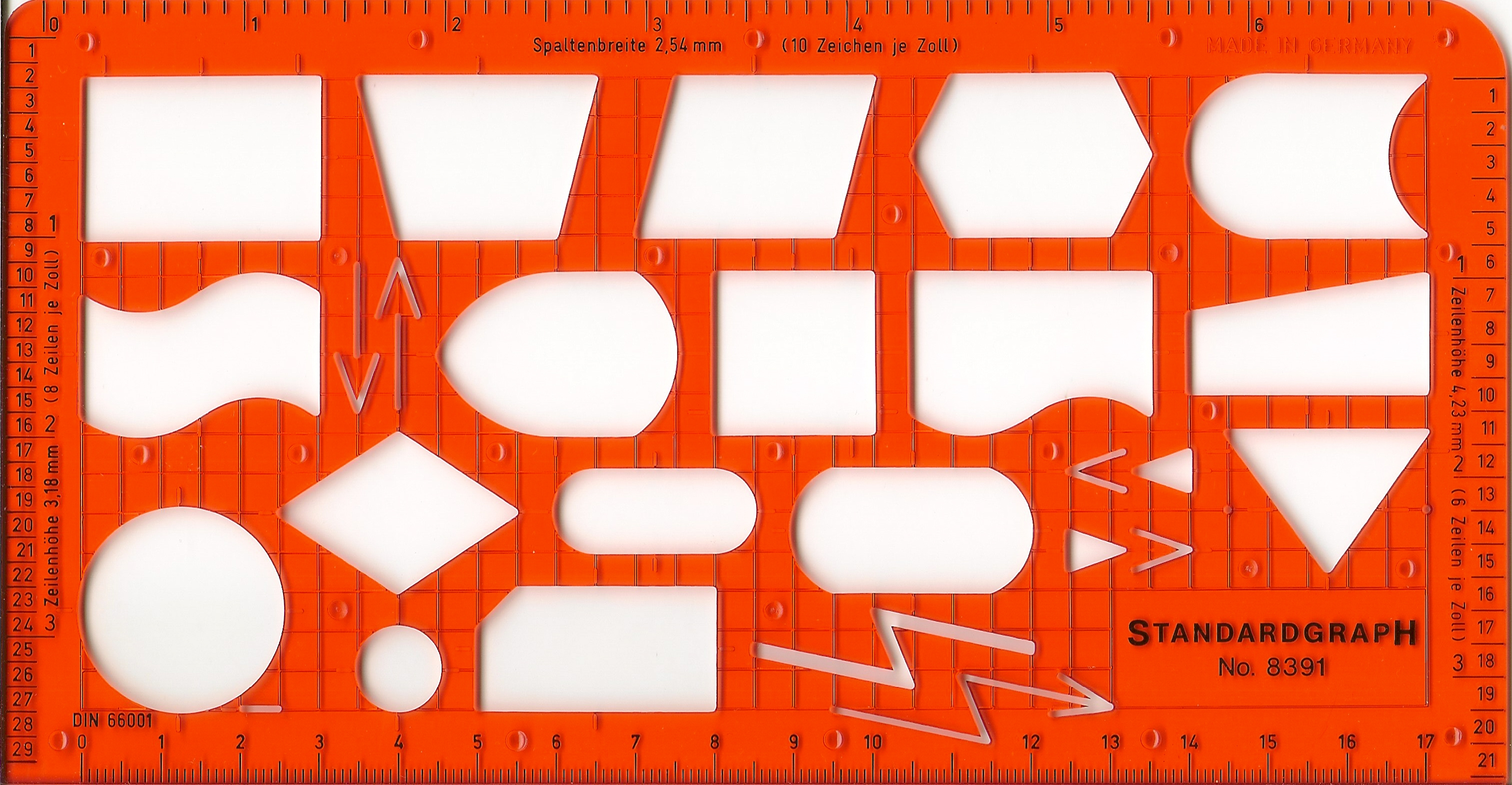 Schablone zur grafischen Darstellung von Programmablaufplänen, erworben um 1988, Kaufpreis 15,90 DM.